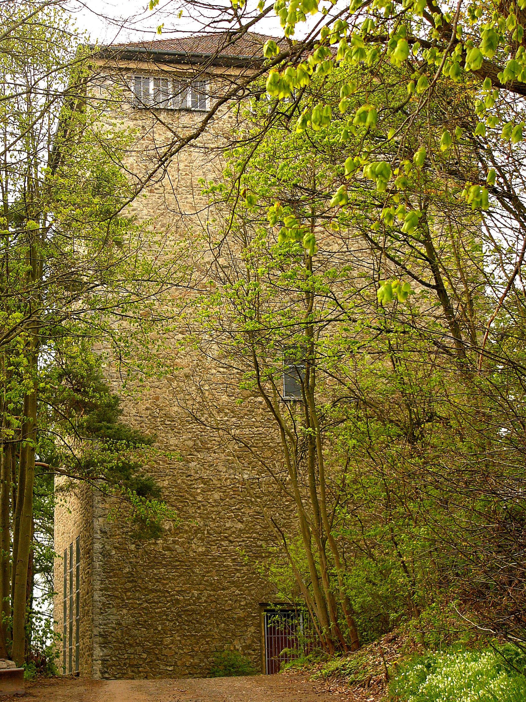 1942; Wasserturm als Ersatz des Vorgängerbaus von 1906 in unmittelbarer Nähe errichtet, bruchsteinsichtige Fassade.